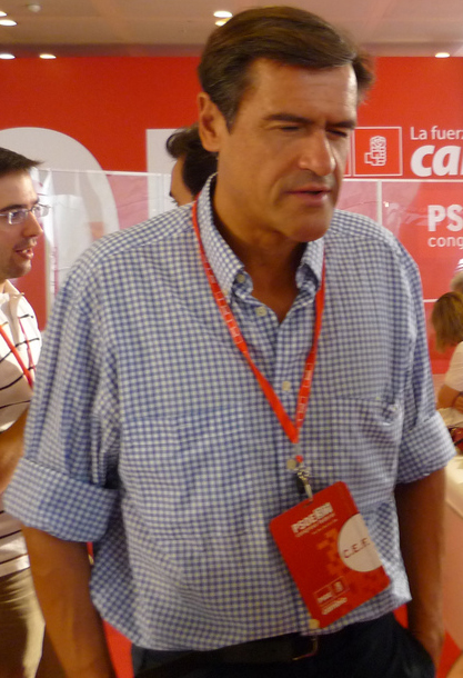 Juan Fernando Lopez Aguilar politikaria eta Justizia Ministro ohia